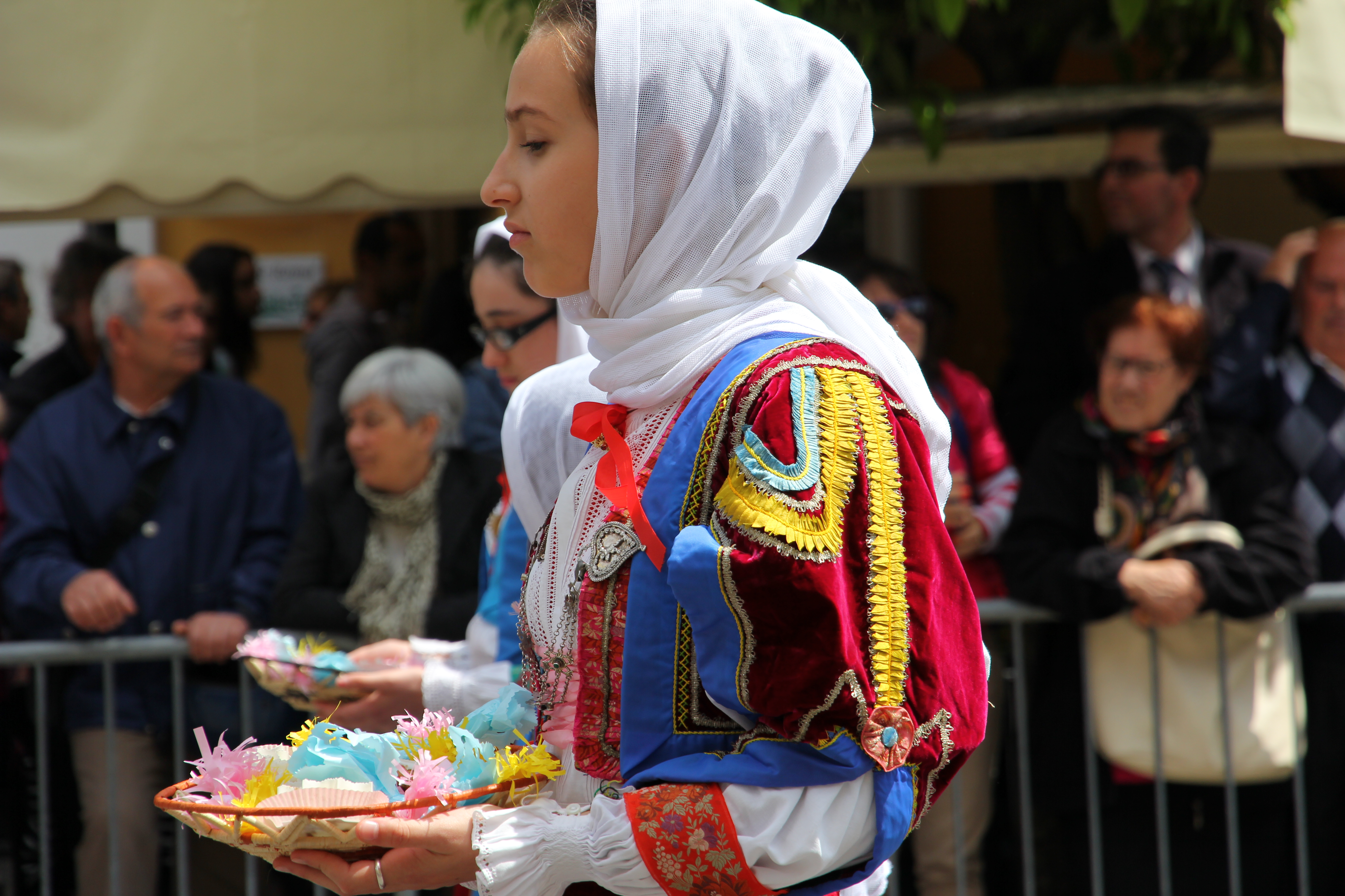 Costume tradizionale